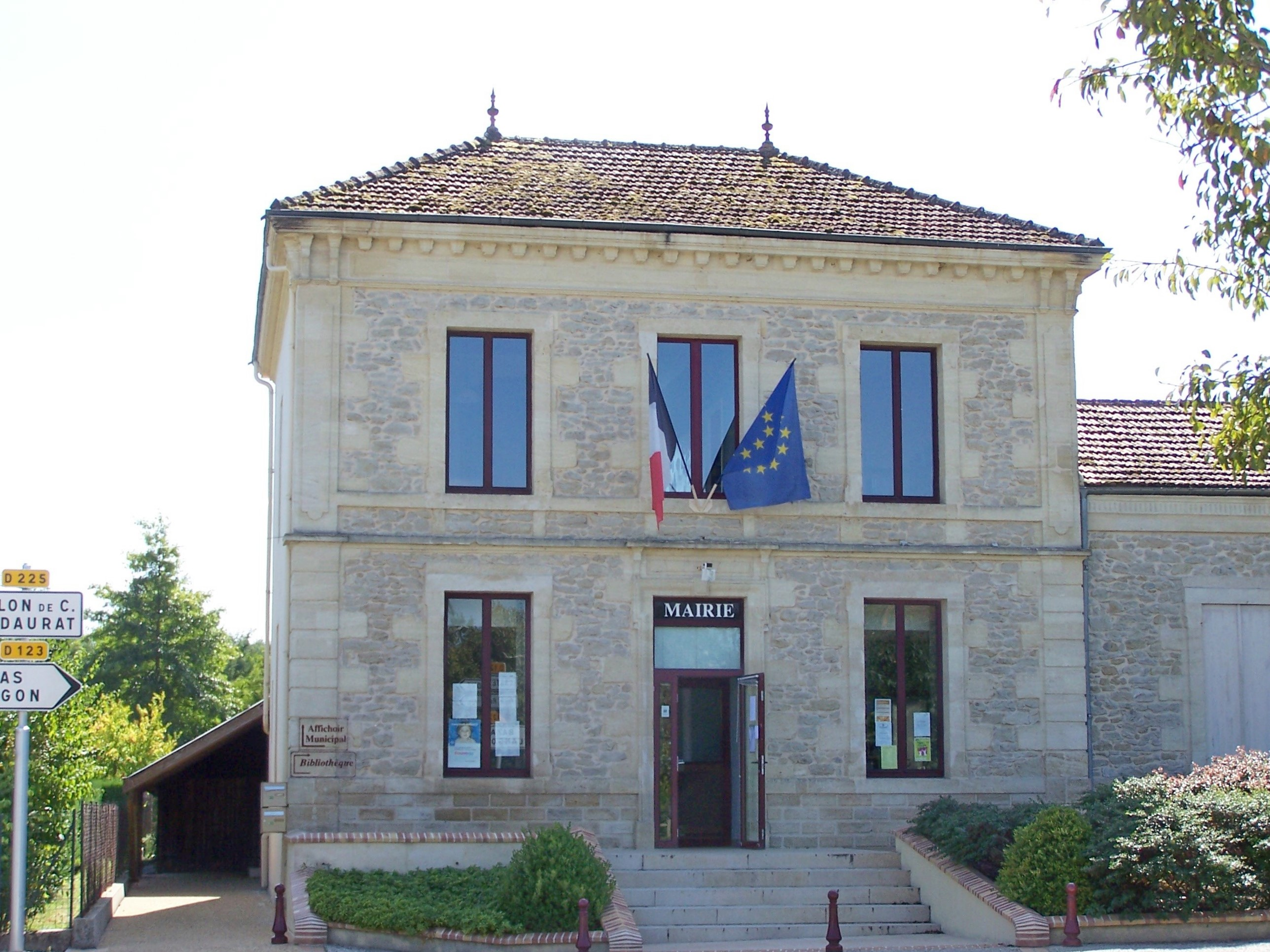 Mairie de Bieujac, Gironde, France